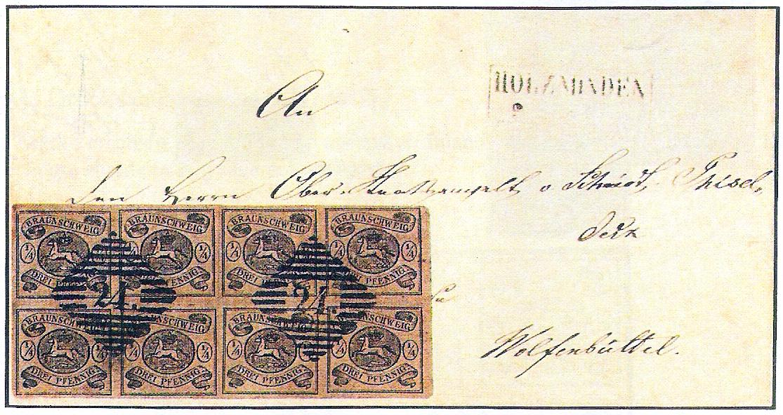 Ein Brief